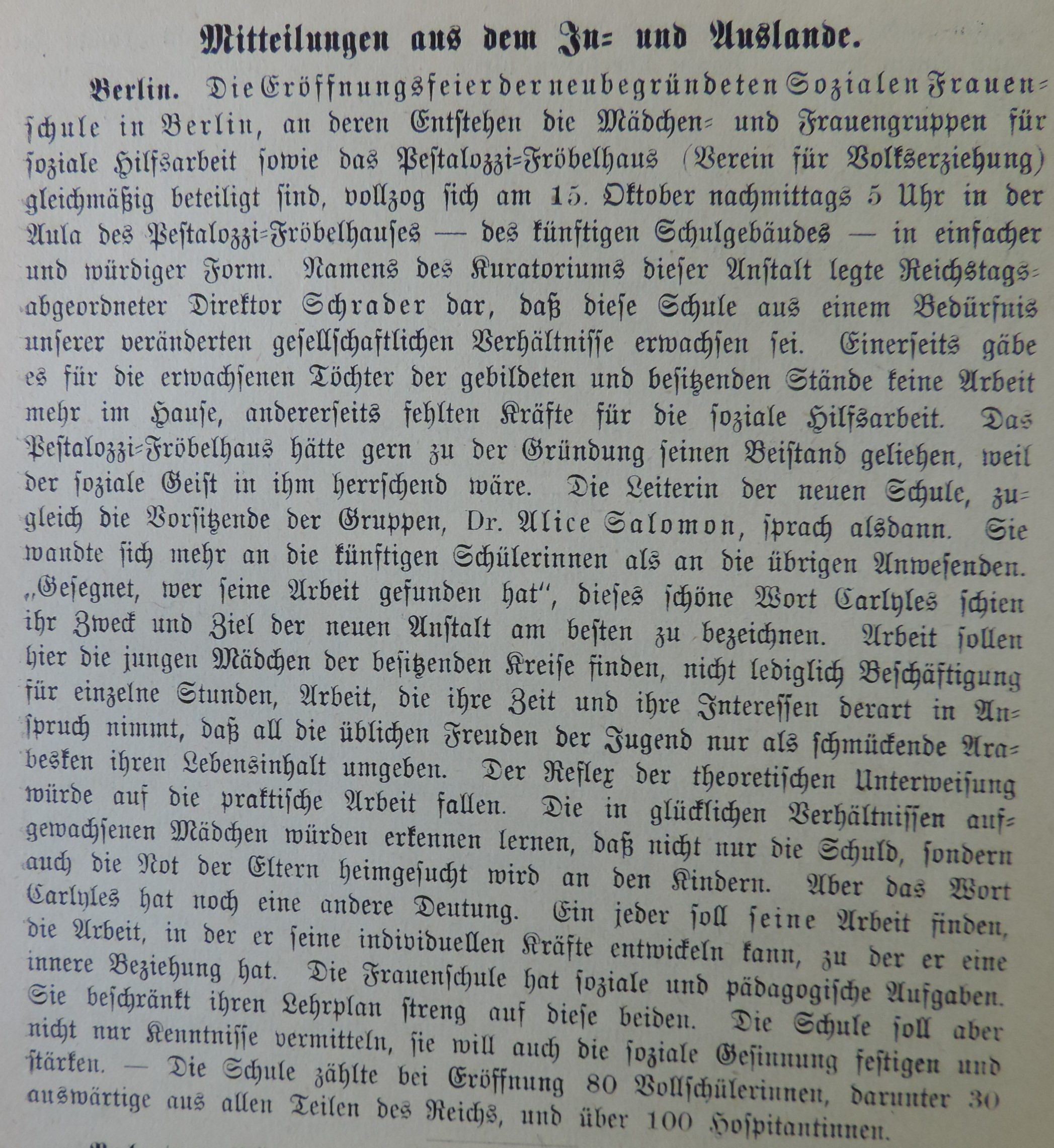 Zur Eröffnung der Sozailen Frauenschule in Berlin